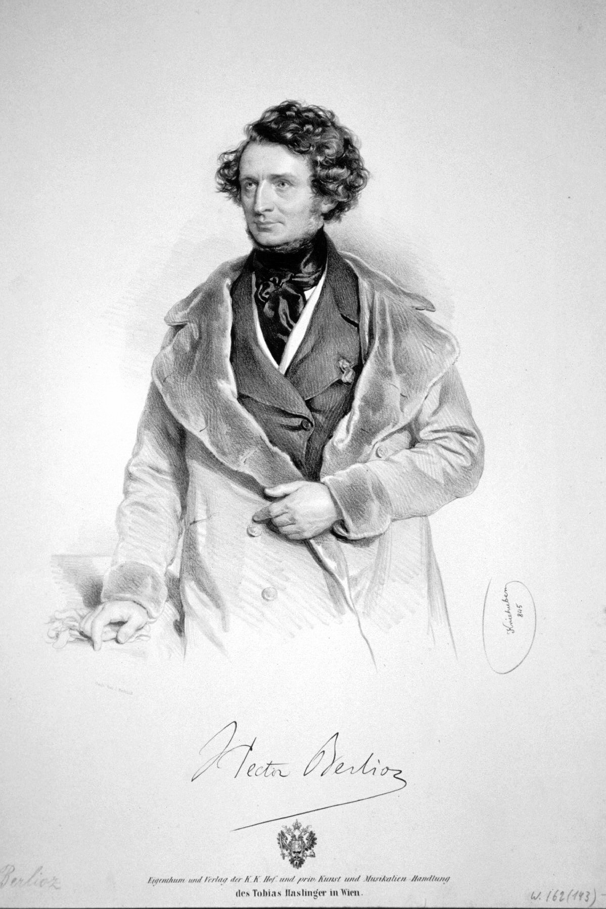 Hector Berlioz (1803-1869), französischer Komponist